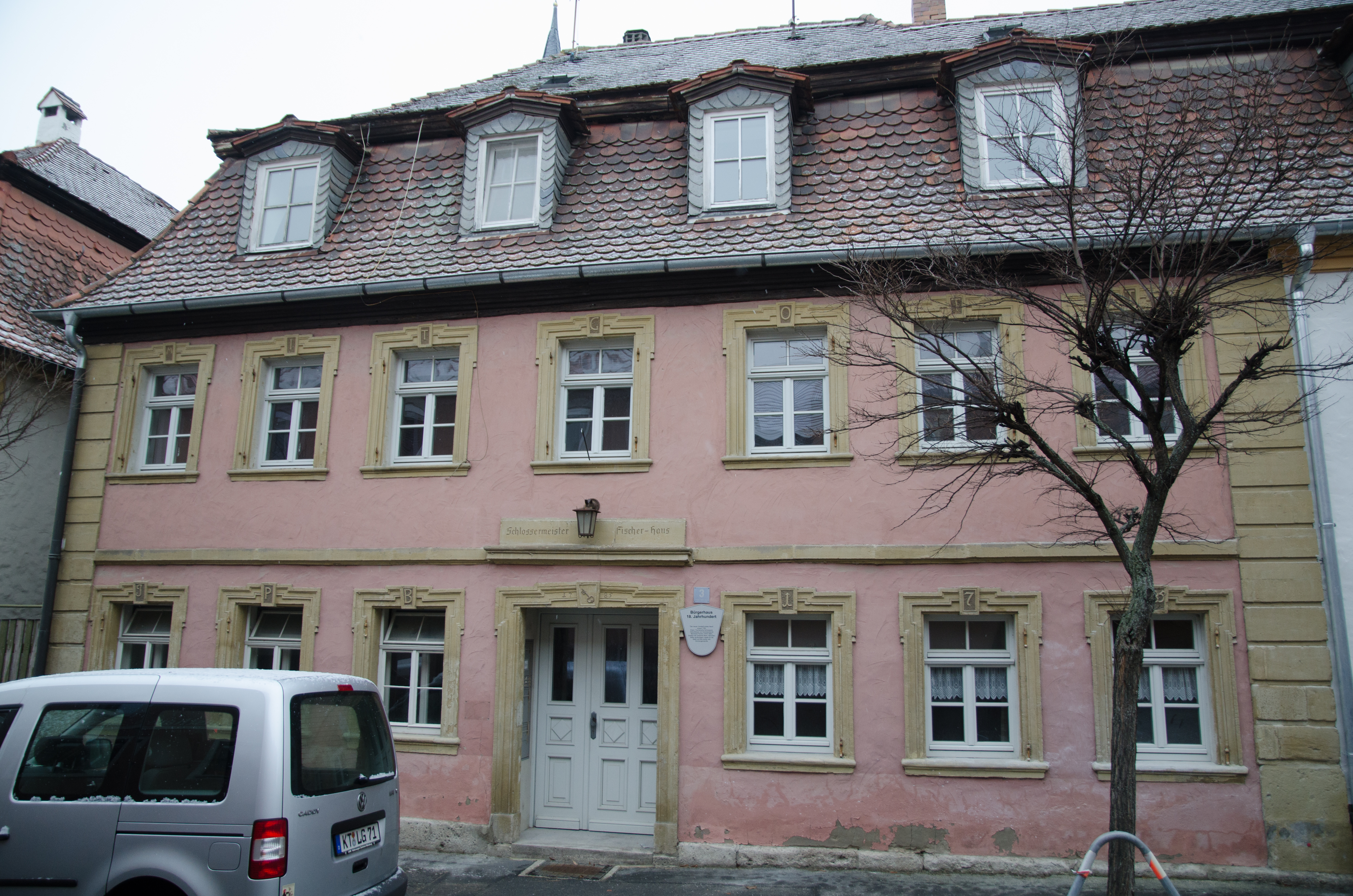 Marktbreit, Bernhard-Fischer-Straße 3